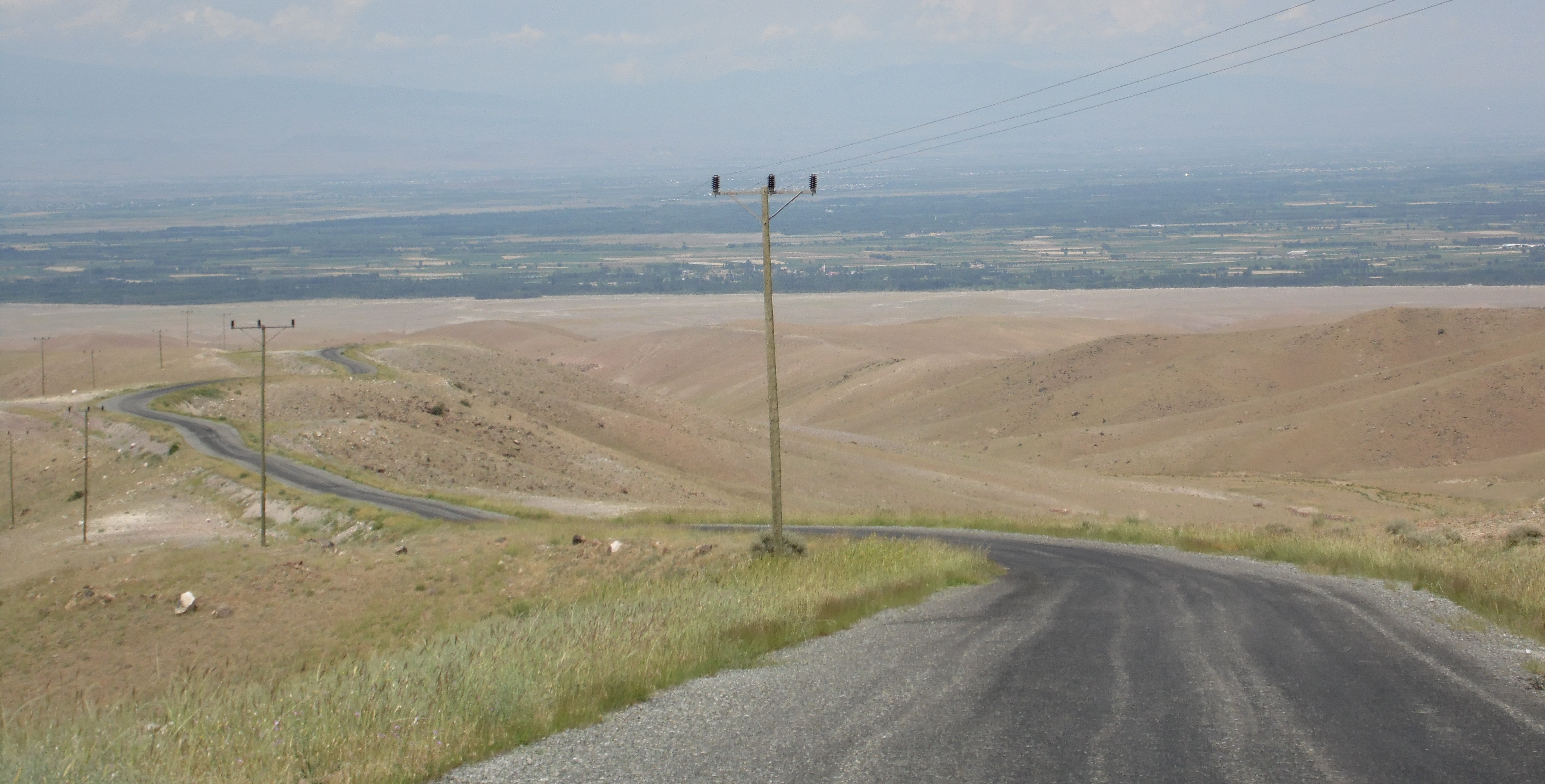 ığdır ovasına inerken